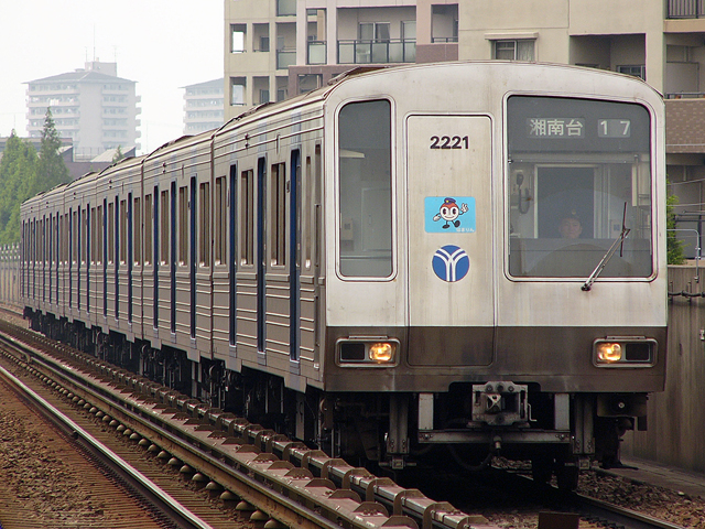 横浜市交通局2000形、仲町台駅にて。